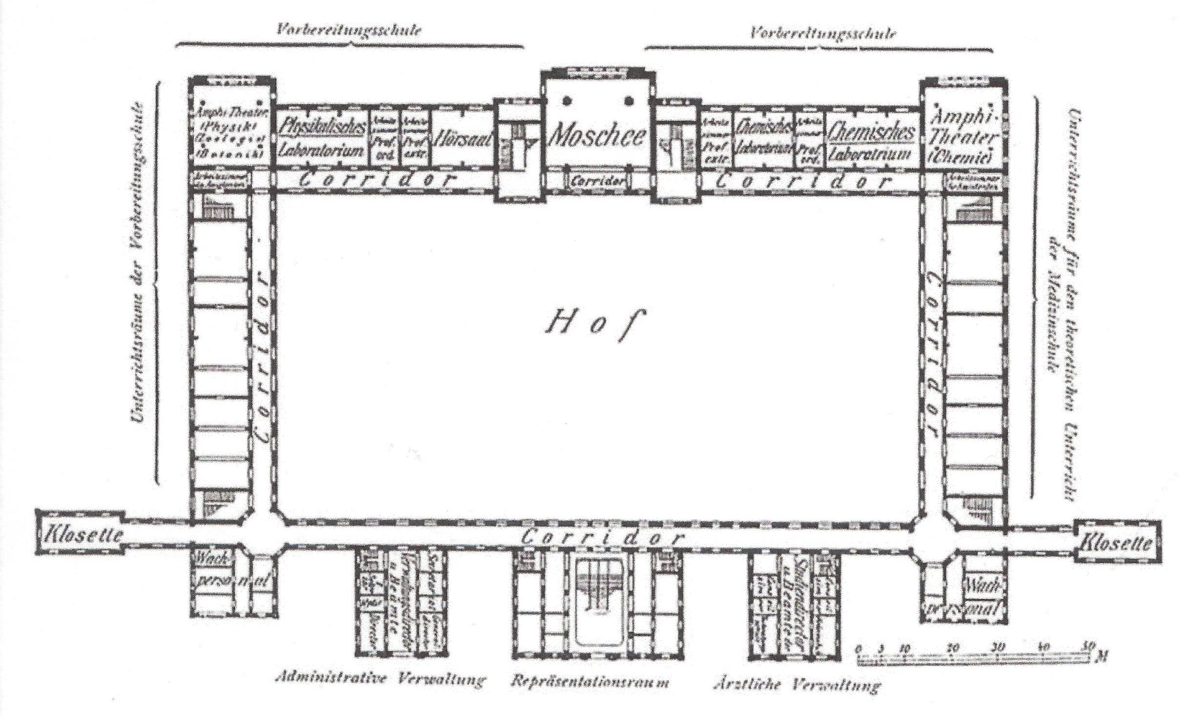 Grundriss der Militärmedizinischen Akademie Gülhane (I) in Konstantinopel